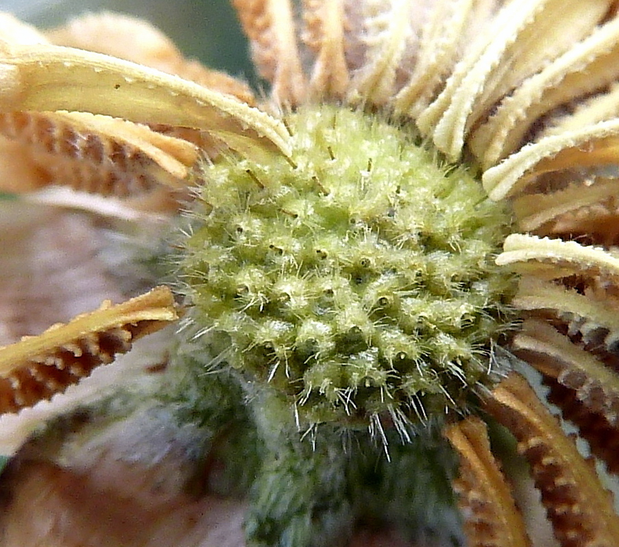 Urospermum picroides - Receptáculo tuberculado-viloso y cipselas in situ. - La Huerta, Albatera, Alicante (España)